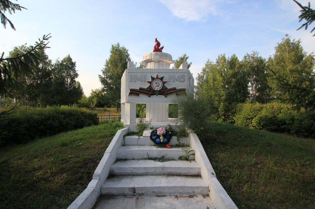 Памятник погибшим в Великой Отечественной войне